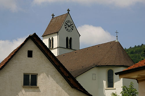 Pfarrkirche Sankt Martin in Blauen (BL)